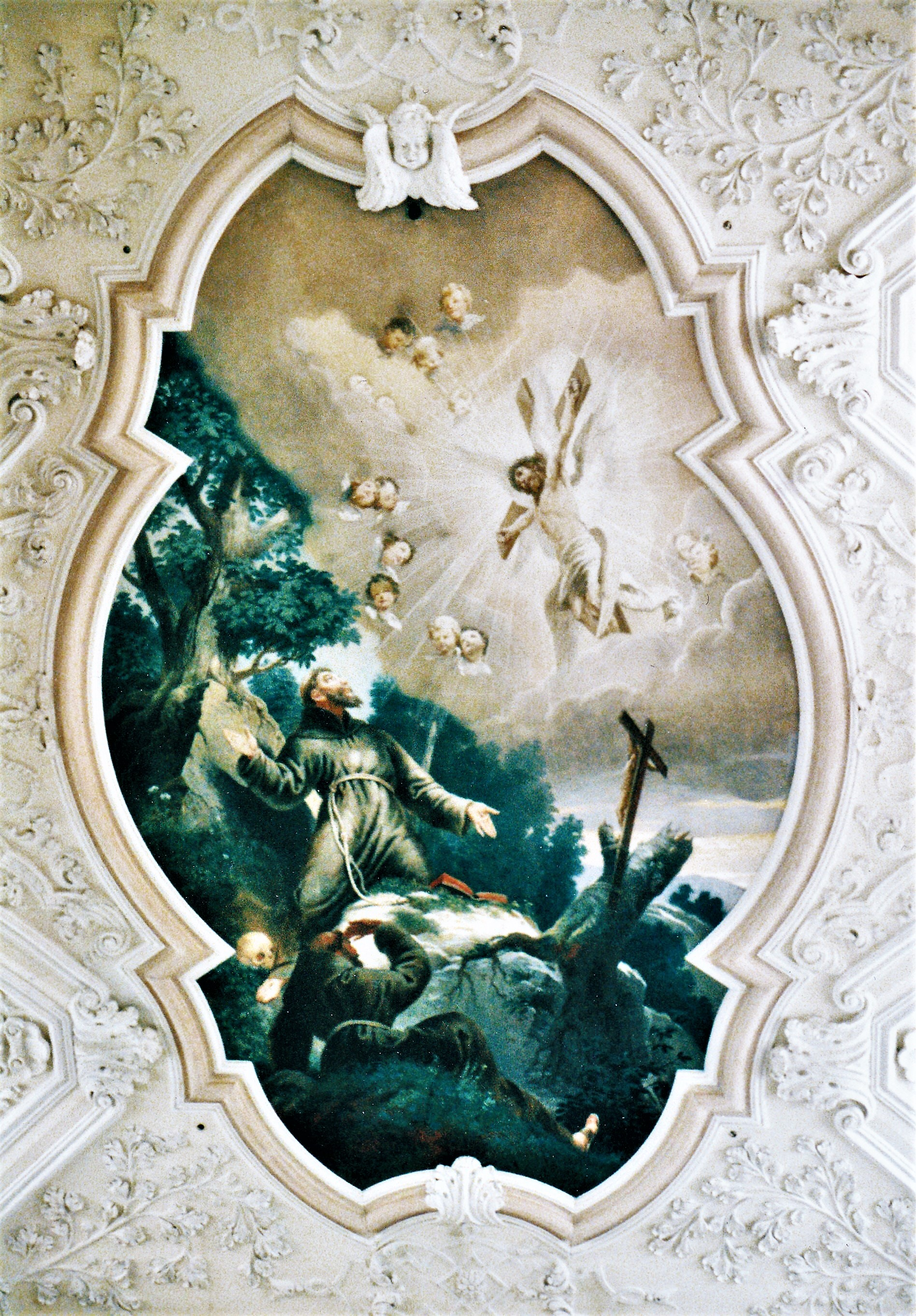 Klosterkirche Oberzell, Deckenfresko im südlichen Querhaus (nach 1901): Die Stigmatisation des hl. Franziskus 1224 auf dem Berg La Verna